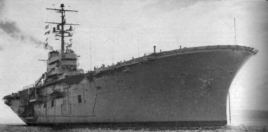 USS Iwo Jima